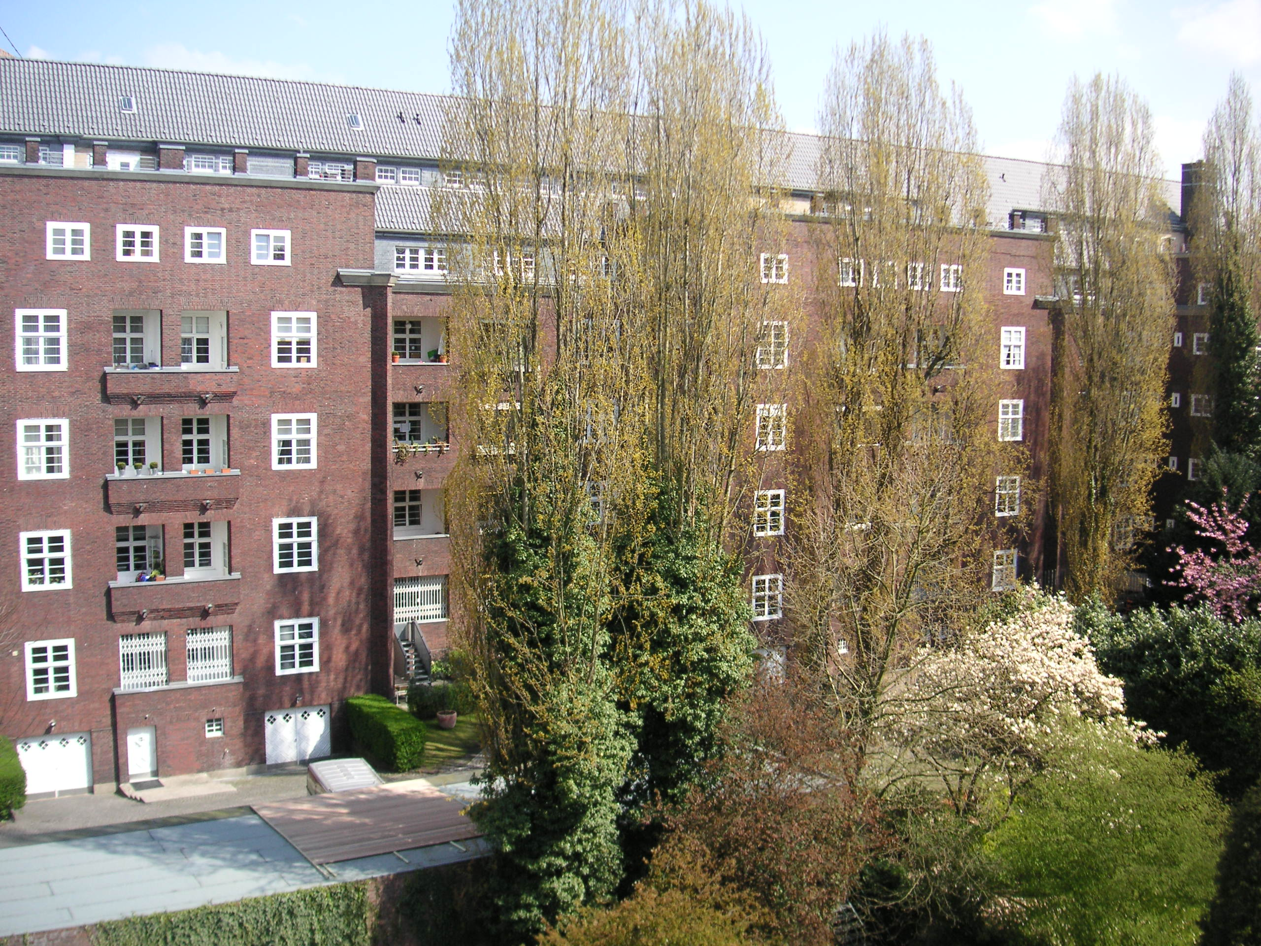 Rheinparksiedlung Düsseldorf-Golzheim, Blick in den Innenhof